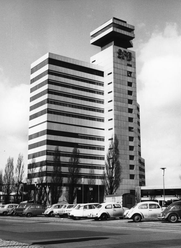 Berlin-West Das neue Fernseh-Zentrum des SFB am Theodor-Heuss-Platz